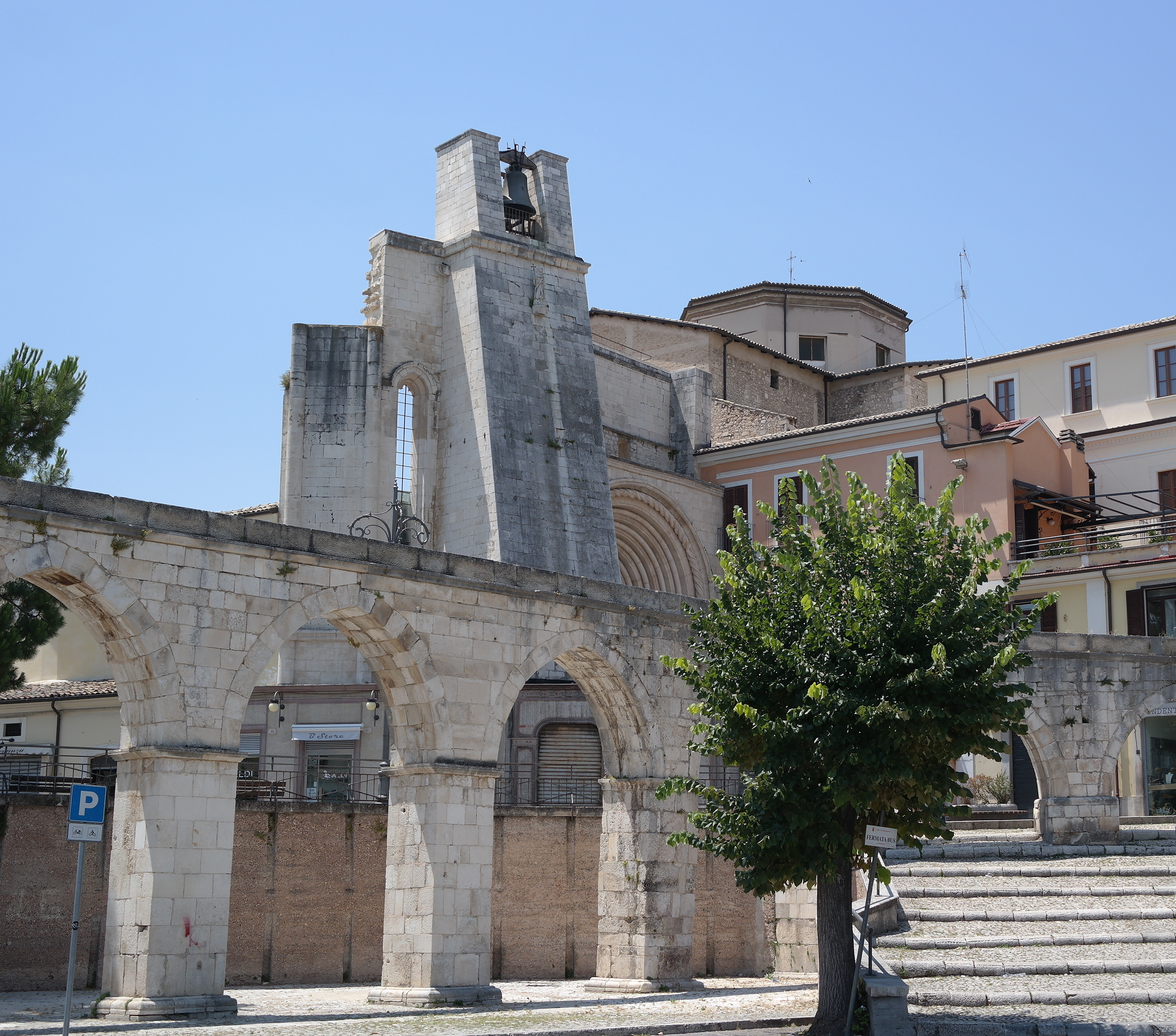 Chiesa di San Francesco della Scarpa a Sulmona